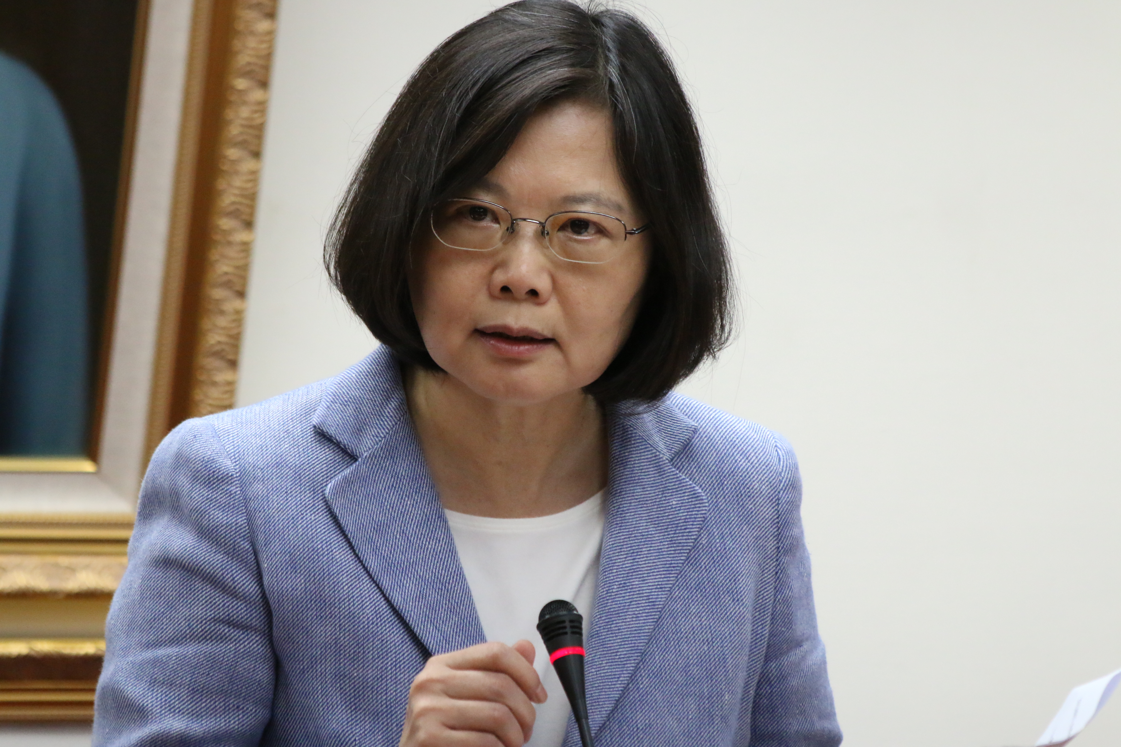 中文（台灣）: 台灣民進黨總統候選人蔡英文